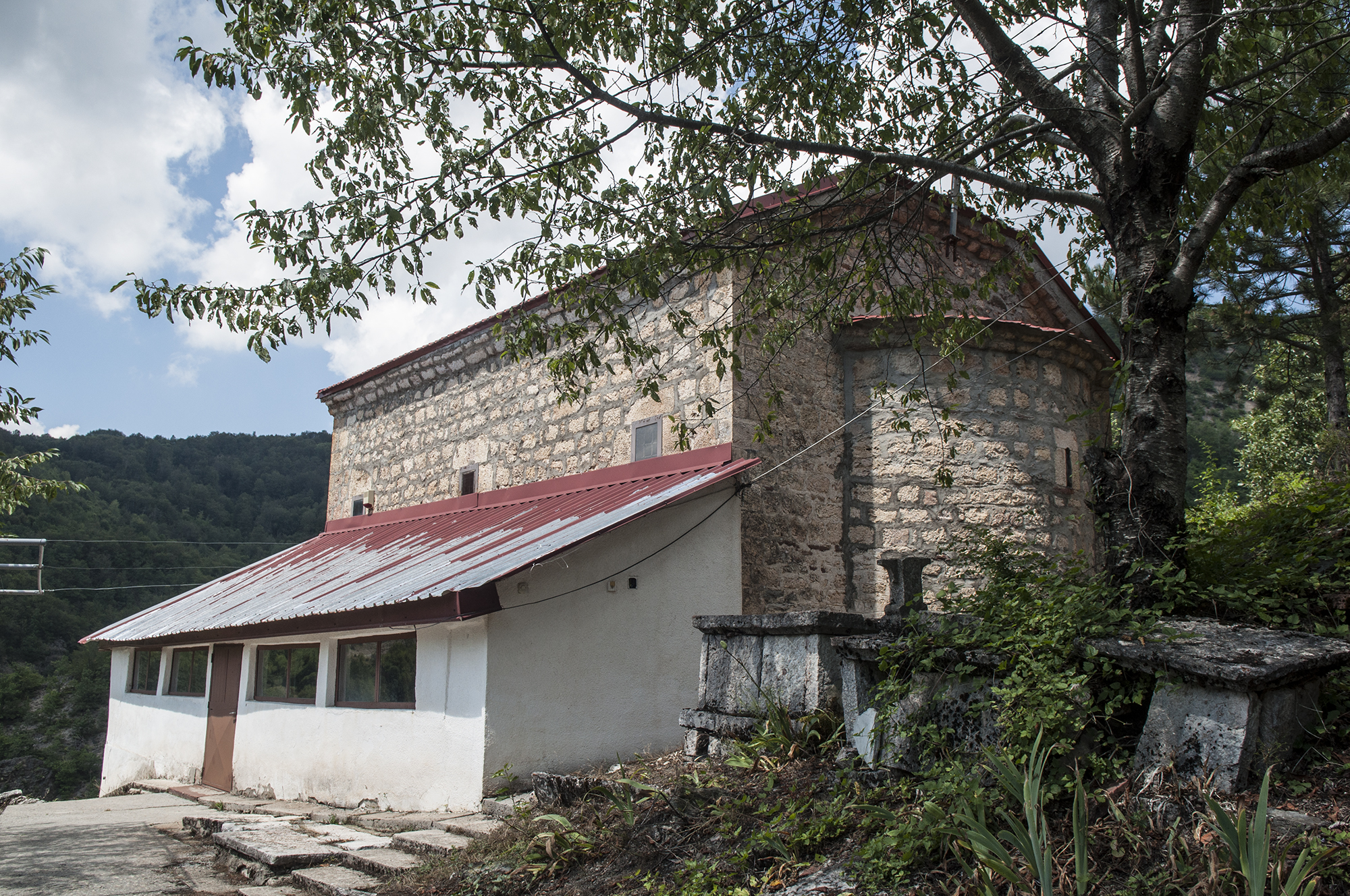 Изглед на црквата Света Недела во Ржаново